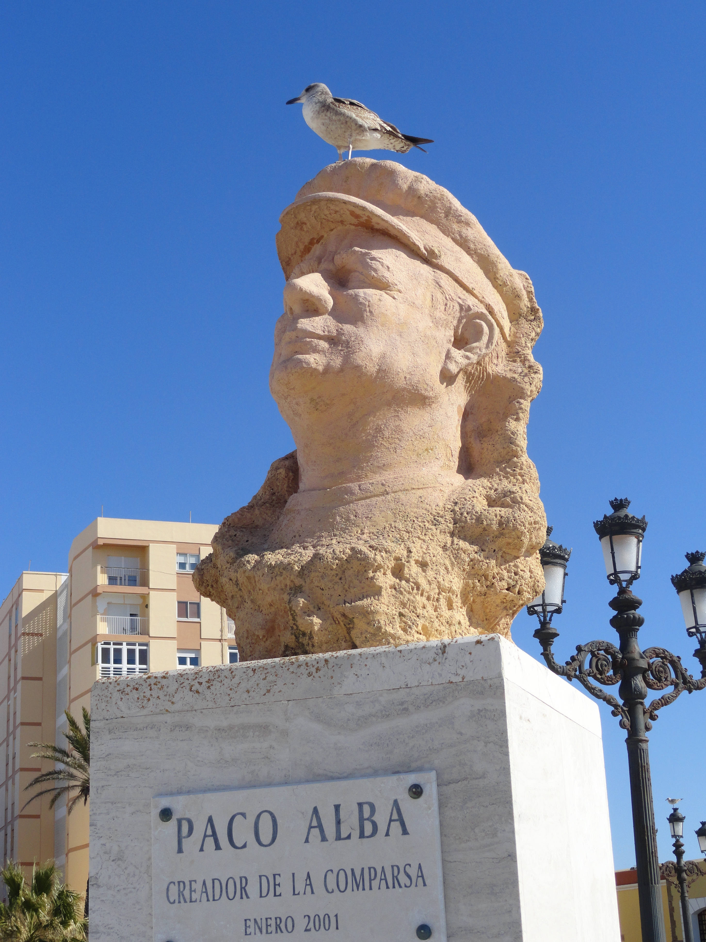 Paco Alba in Cadiz